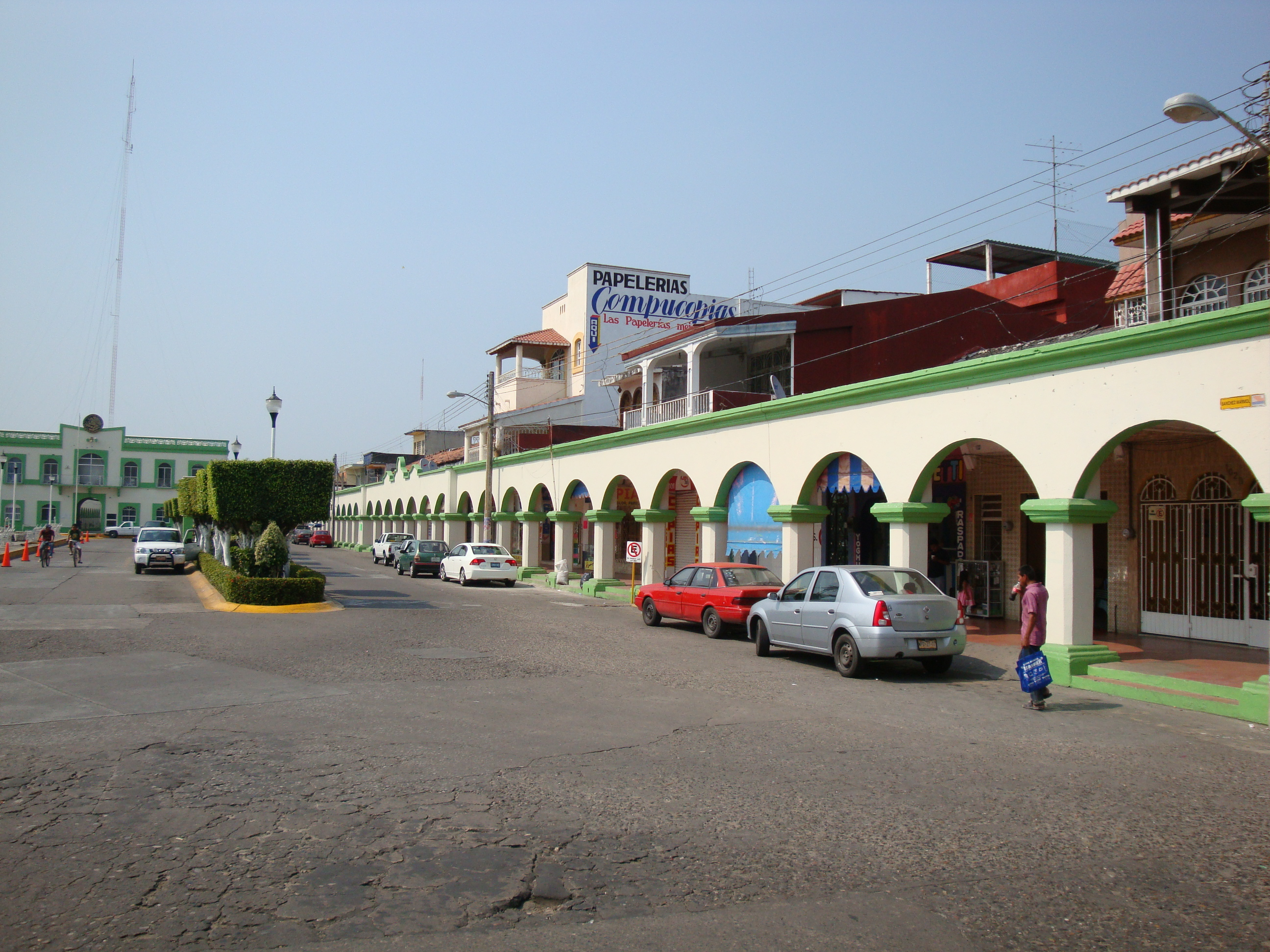 Portales del parque Juárez de la ciudad de Comalcalco, Tabasco, México.